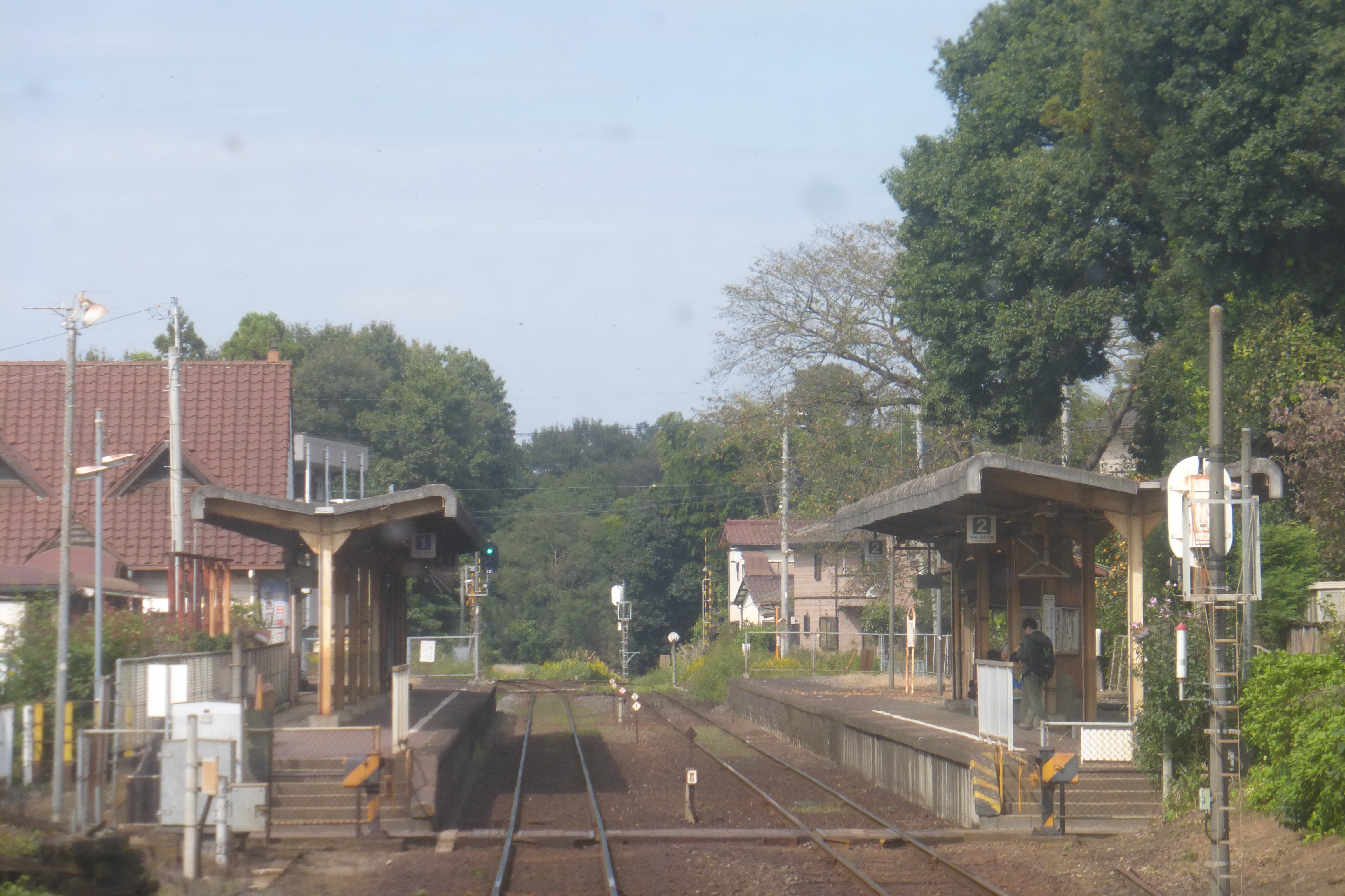 Kokinu Station platforms (小絹駅のホーム)